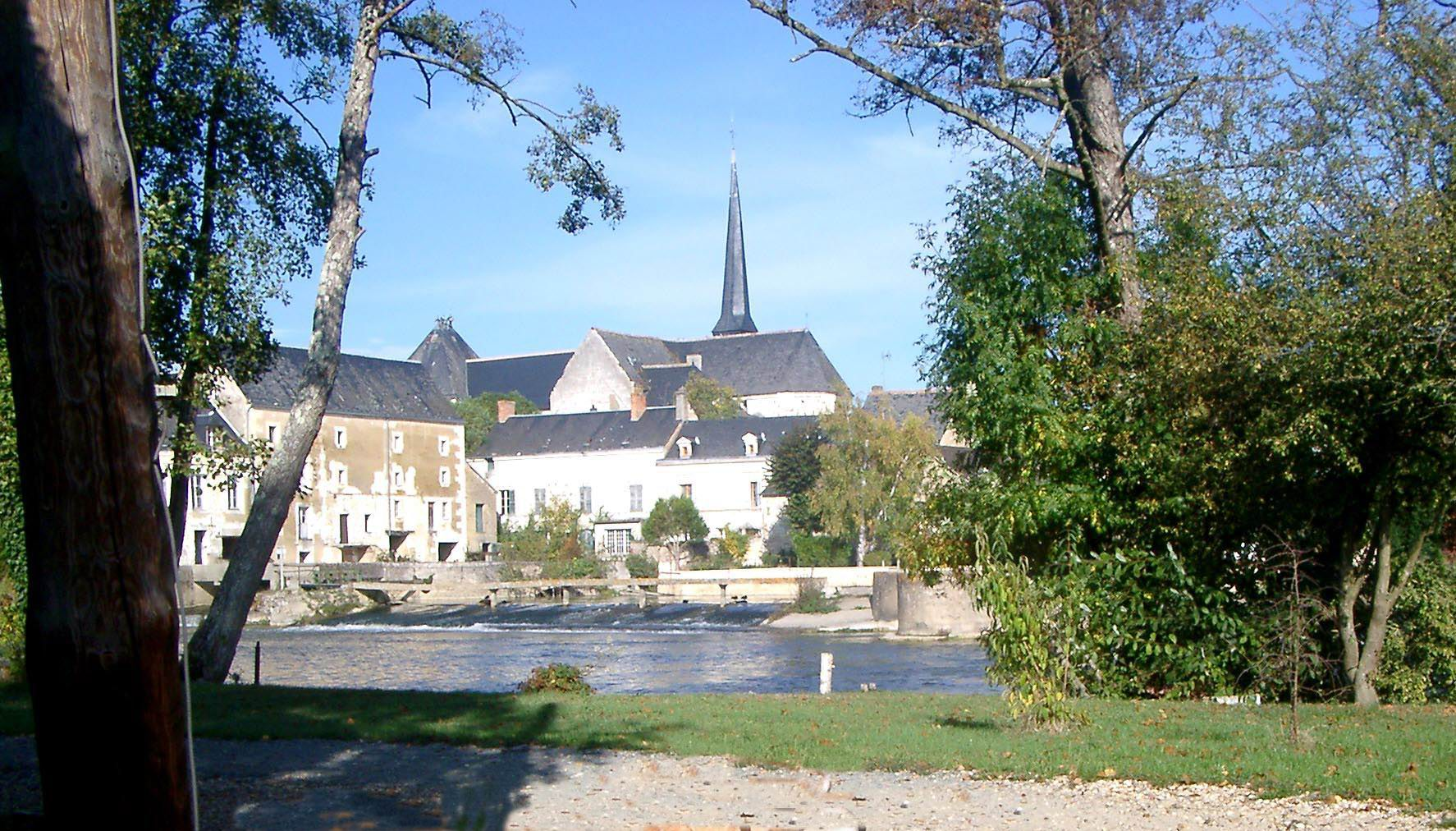 barrage sur le loir, moulin et eglise